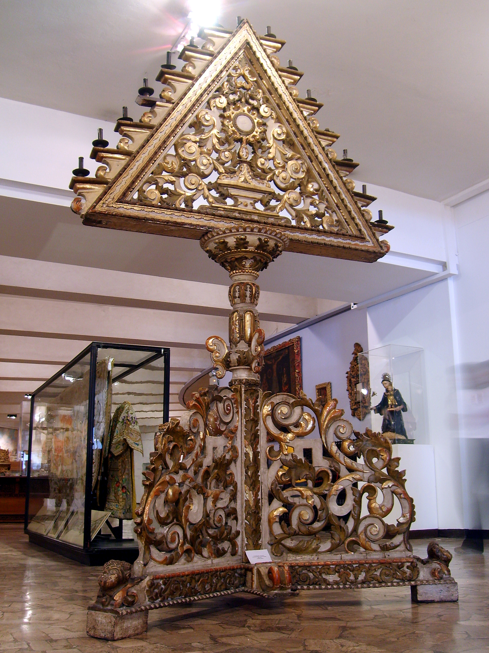 Tenebrario colonial. Perteneció a la Iglesia Catedral de Santiago de Chile. Siglo XVII. Seminario Pontificio. Forma parte de la colección del Museo del Carmen de Maipú, en Santiago de Chile.